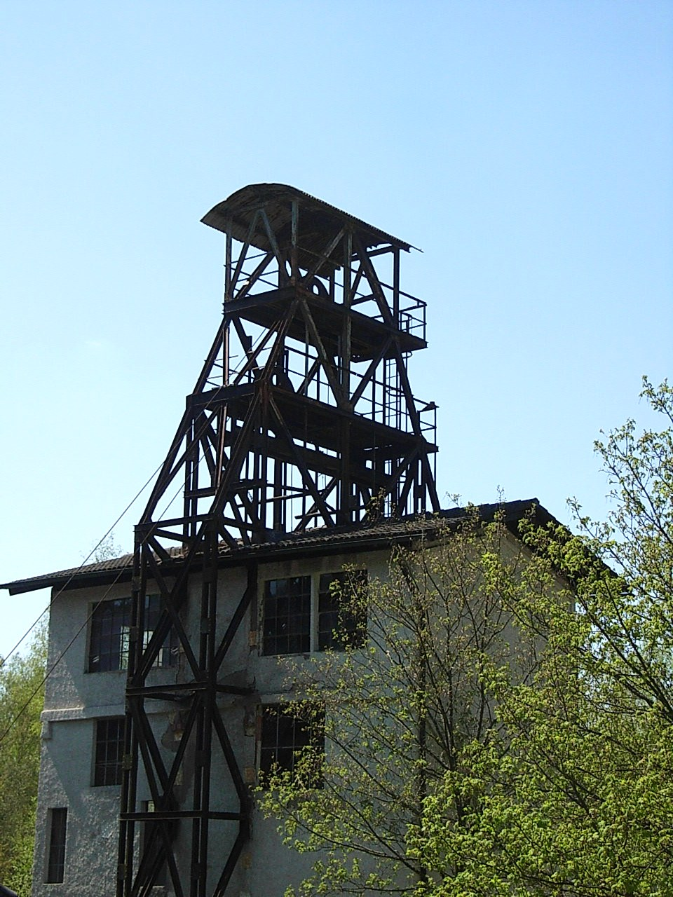 Förderturm im Graphitbergwerk Kropfmühl